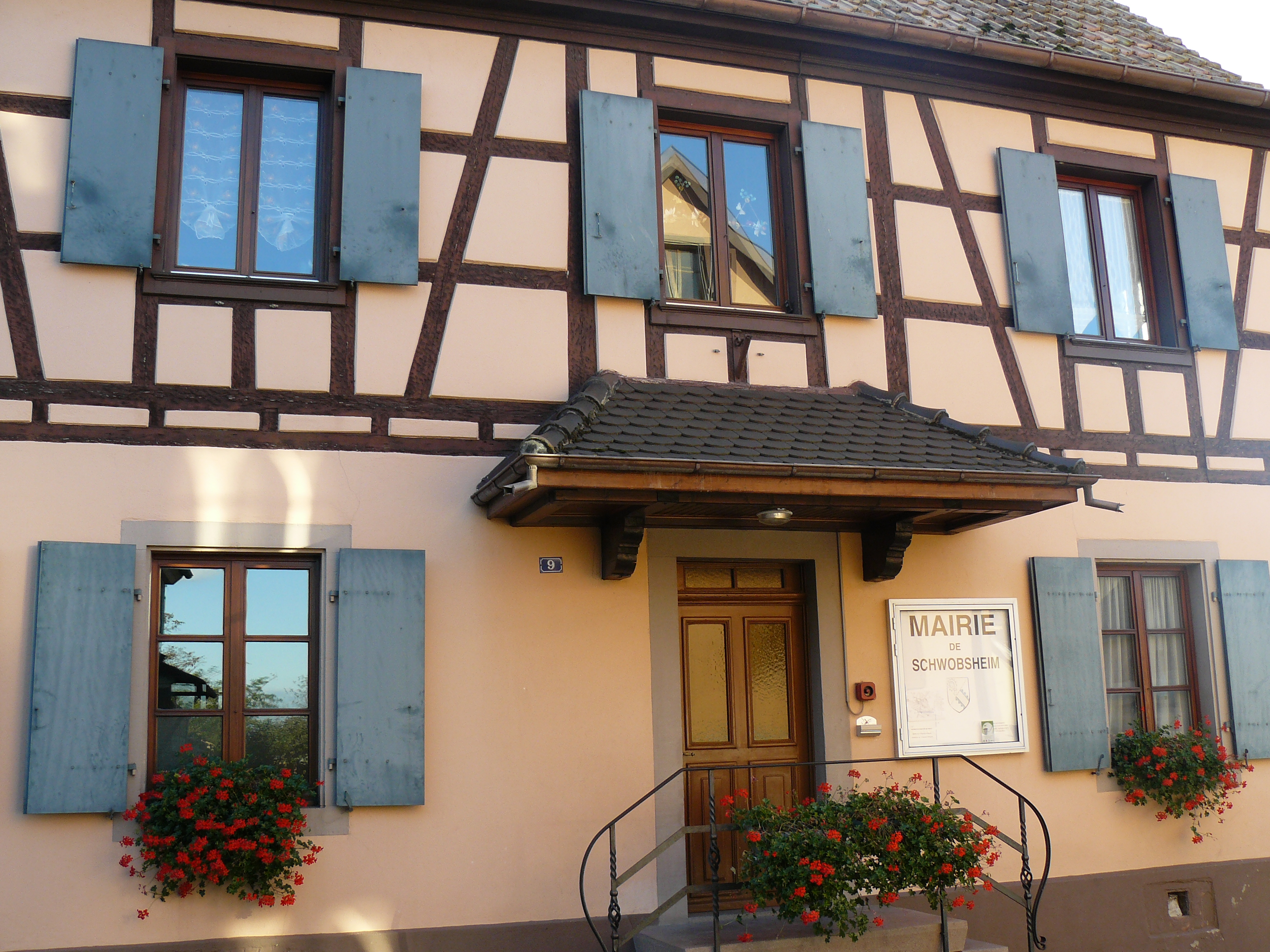 Mairie